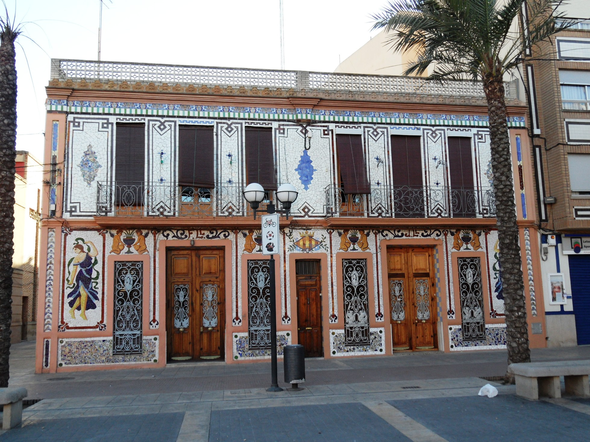 Casa modernista.